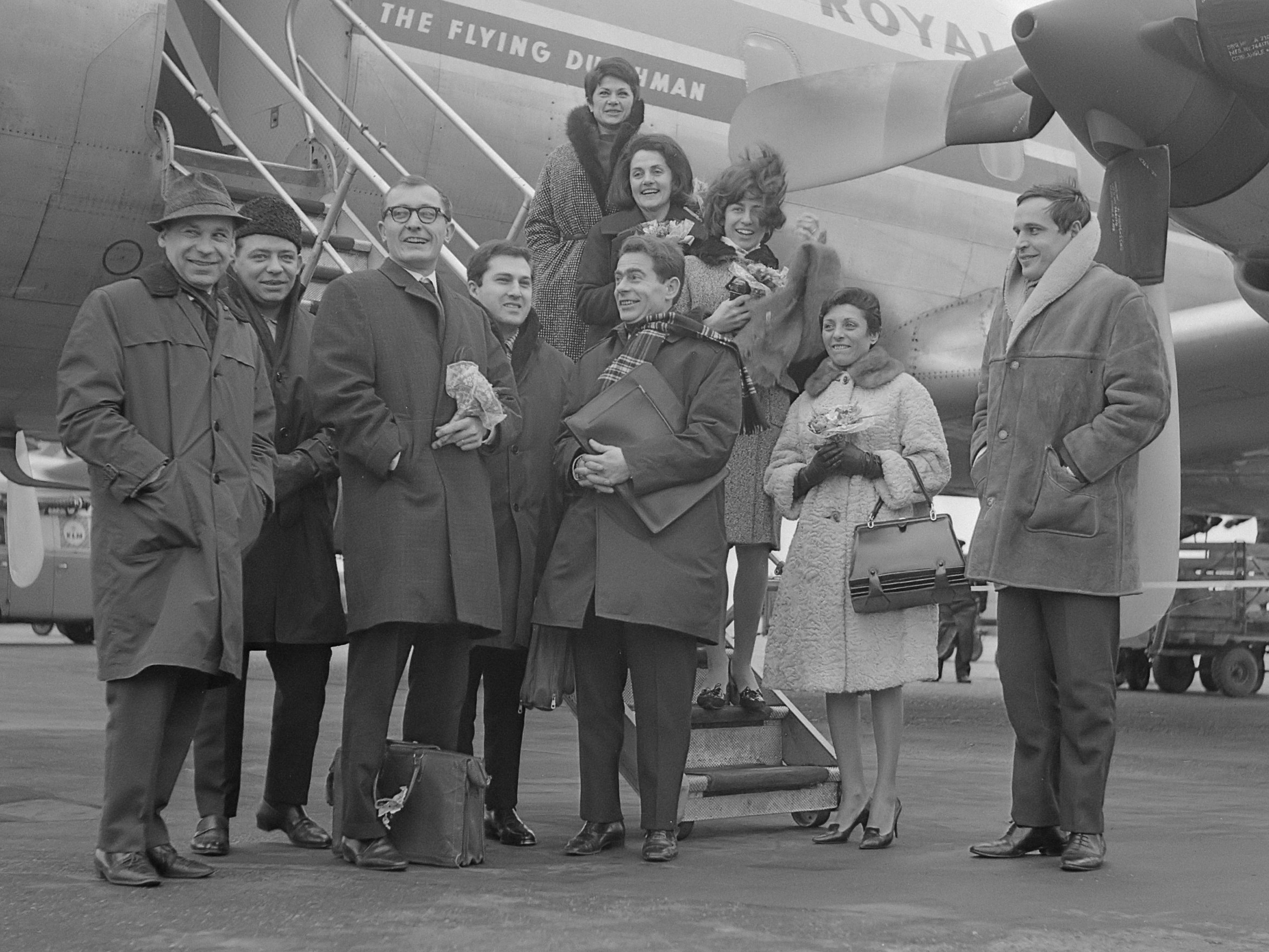 The Swingle Singers (1964) De Franse vocale groep "Les Swingle Singers" uit Parijs op Schiphol voor optreden Avro 4 maart 1964